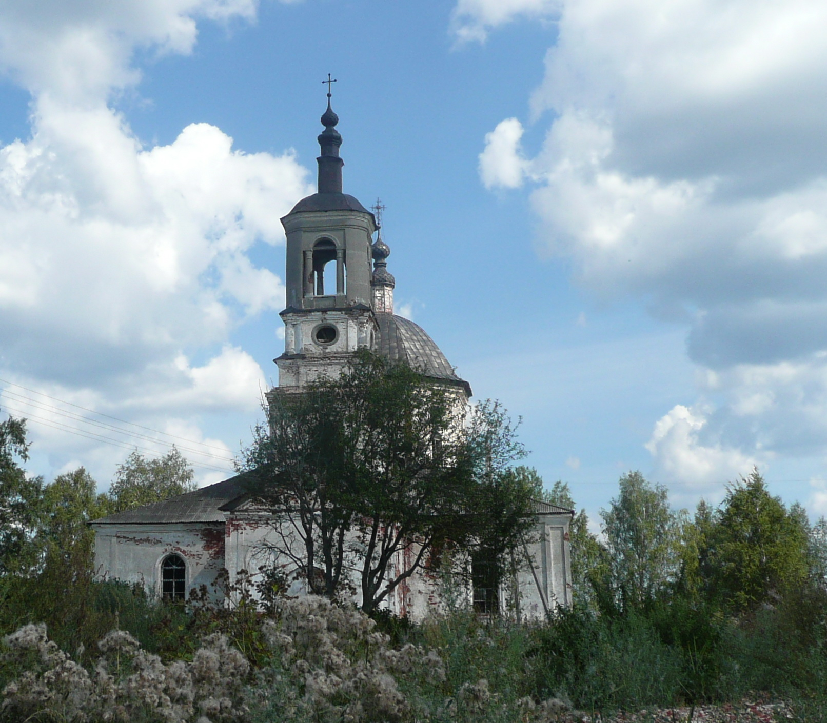 Богоявленская церковь в Буйлове